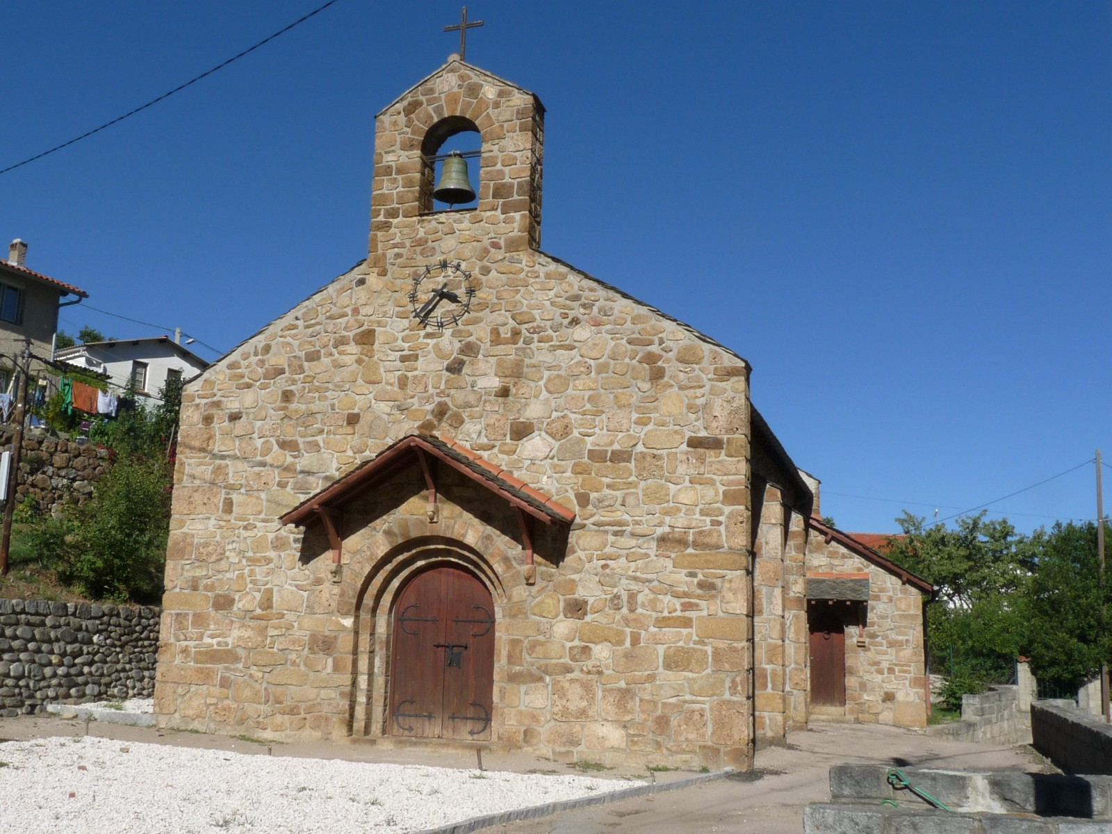 Eglise d'Escaro , Pyrénées-Orientales, France